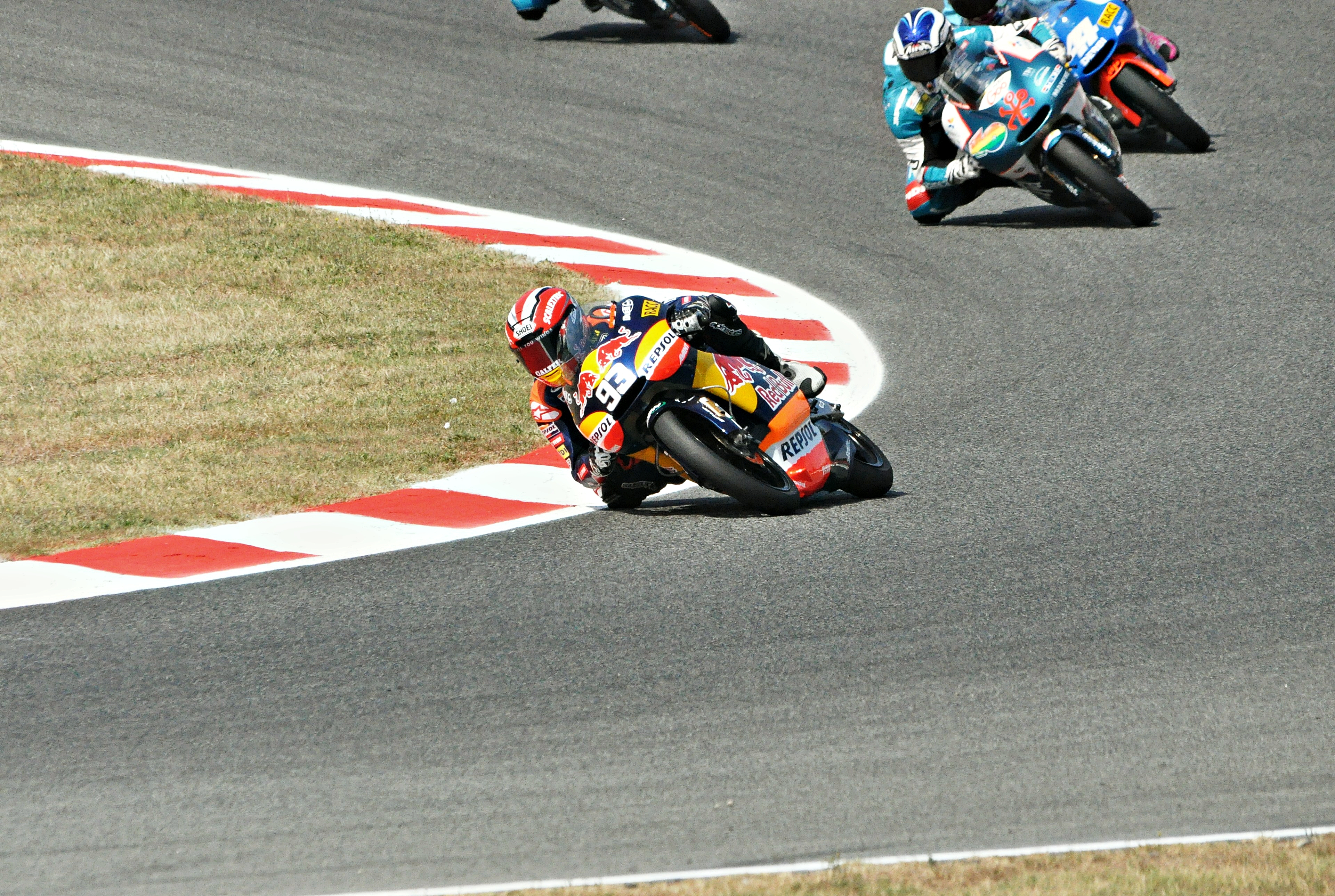 marc marquez circuito de cataluña-2010